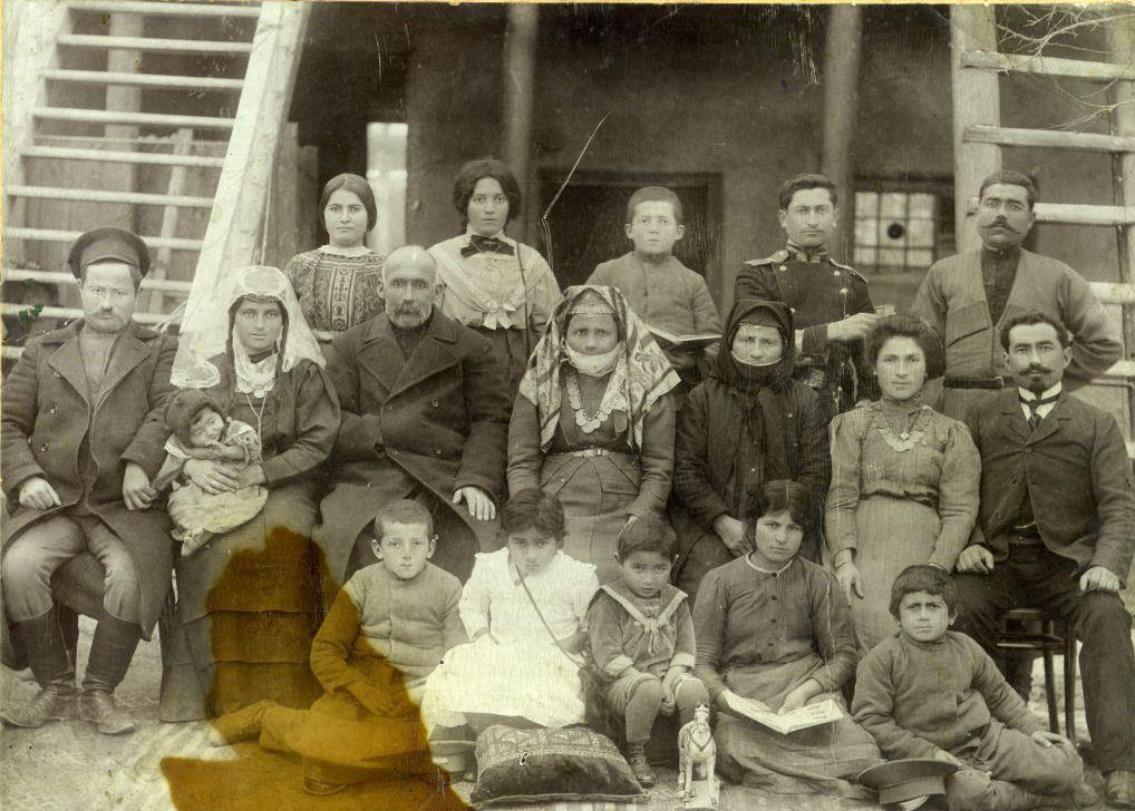 Մելիքյանների ընտանիք, Իգդիր, 1916թ.